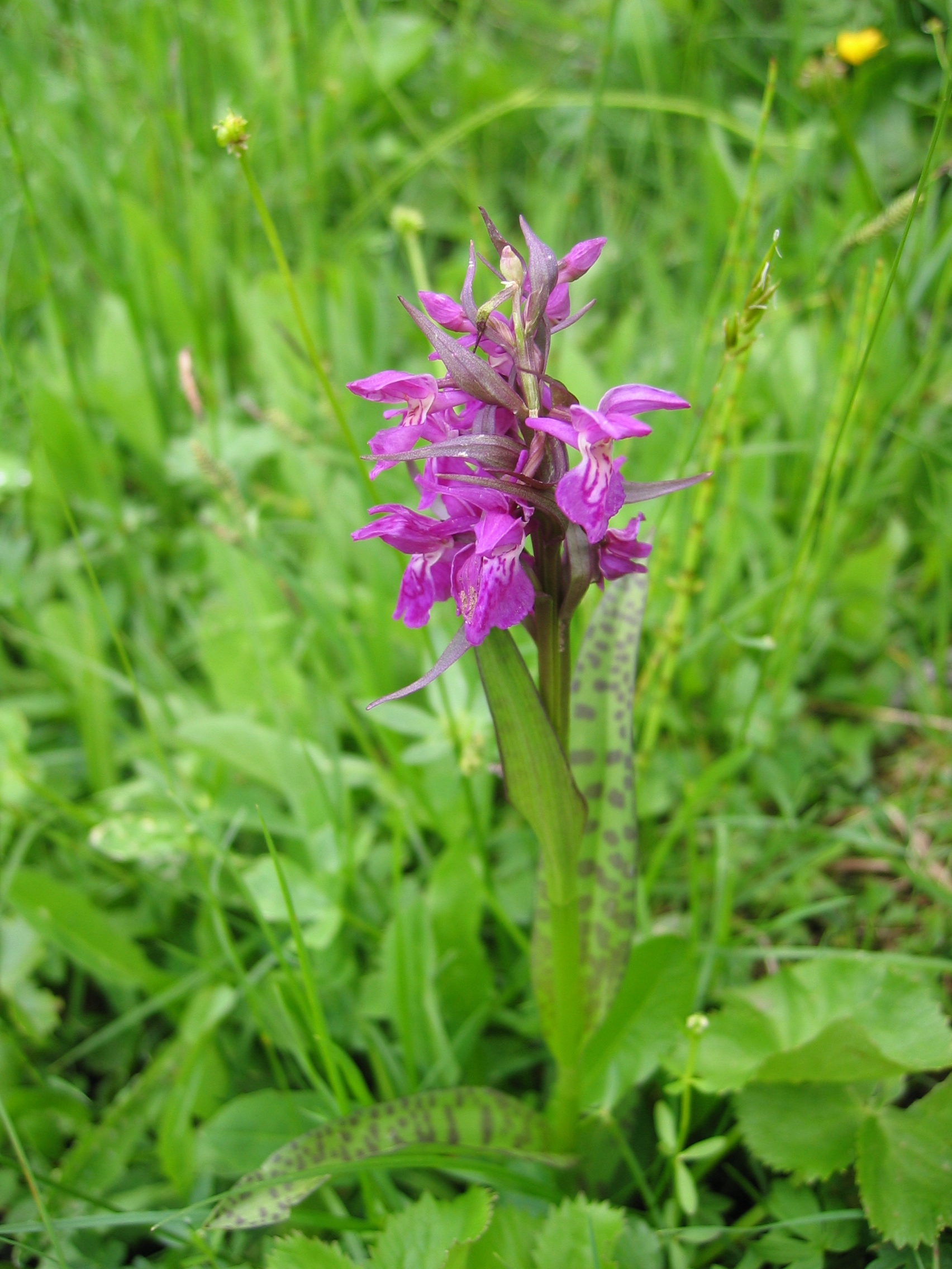 Dactylorhiza_majalis_subsp_alpestris, Wurzeralm ~1.400m, Upper Austria, Austria